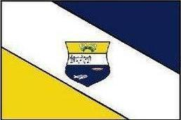 Bandeira de São João do Sabugi - RN